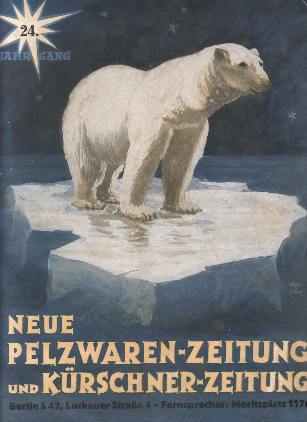 Neue Pelzwaren-Zeitung und Kürschner-Zeitung vom 16. August 1926 mit Anhang „Der Pelztierzüchter“. Titelblatt (etwas beschnitten). Berlin, 16. Oktober 1926 24. Jahrgang, Auflage 8000 Stück, 23 x 30,5 cm, Seiten 149-181